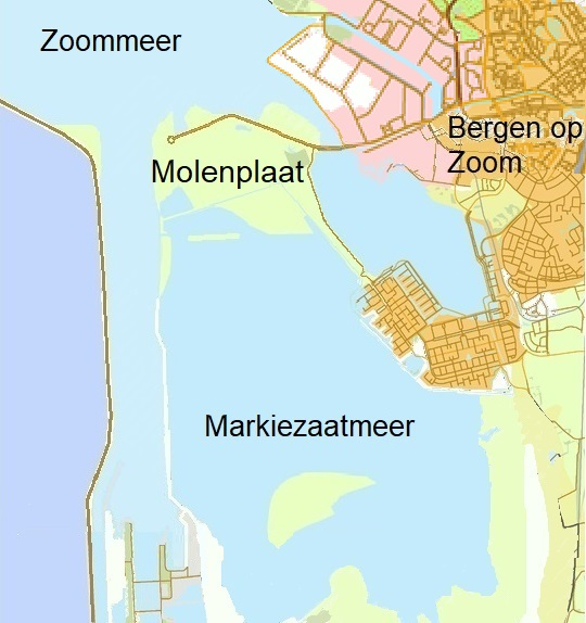 L'île de Molenplaat aux Pays-Bas